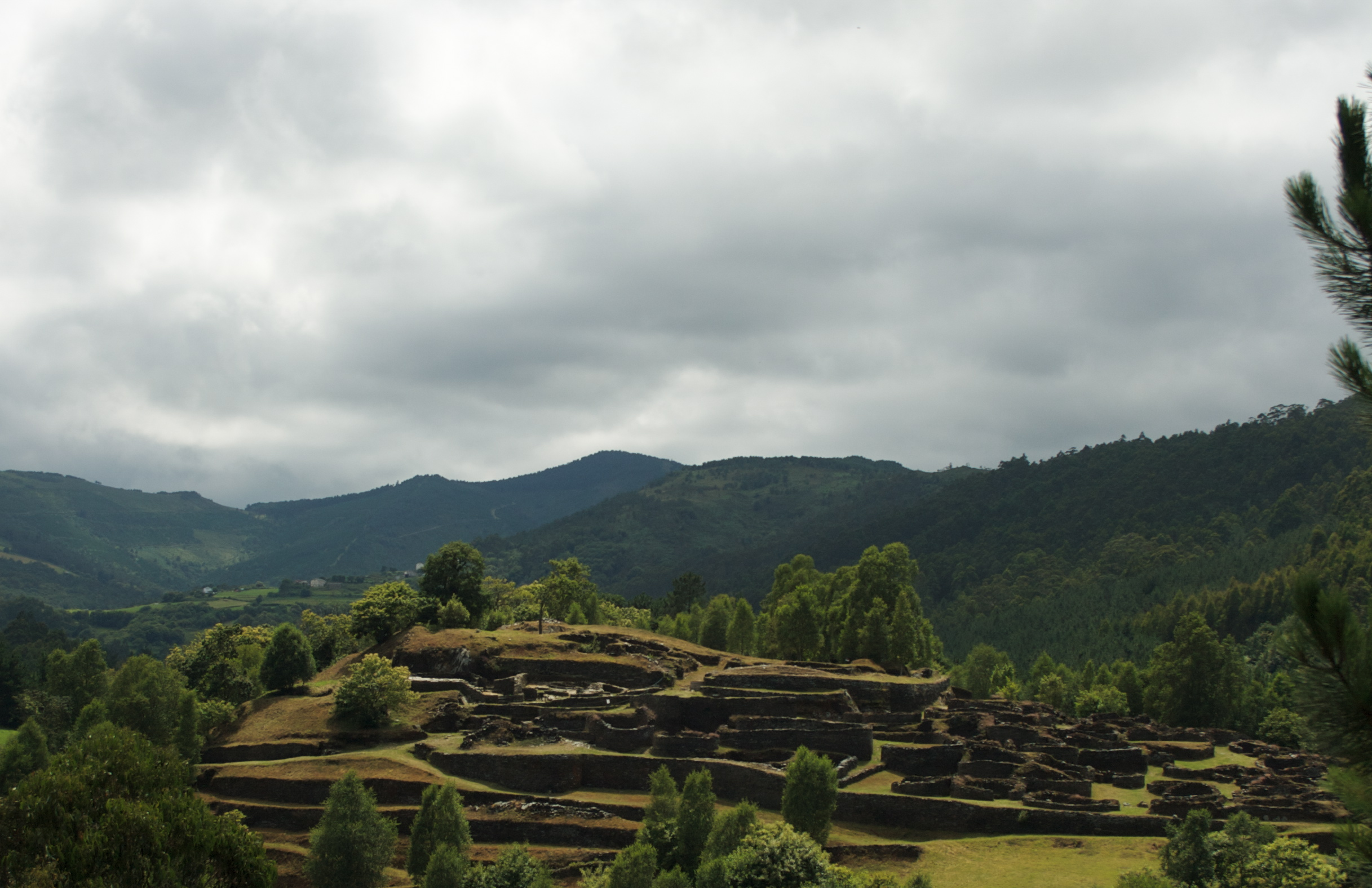 Vista panorámica de los castros de coaña.